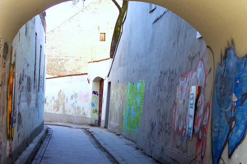 Bernardinų gatvė Vilniuje 2015 metais